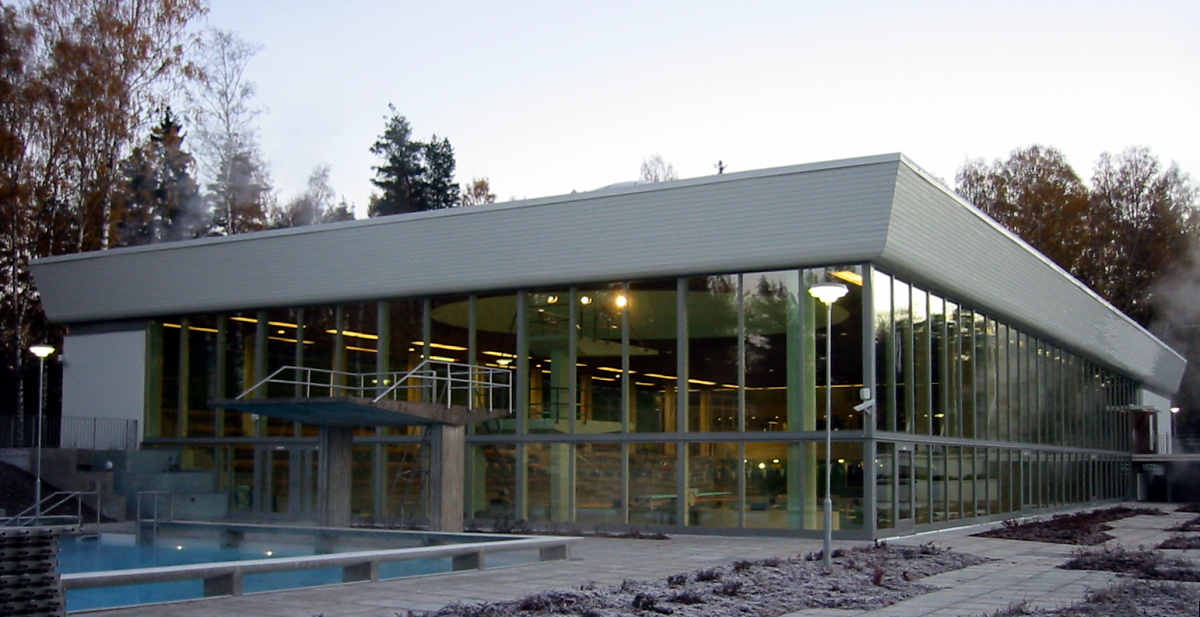 Tapiolan uimahalli syksyllä 2005 ennen peruskorjausta.